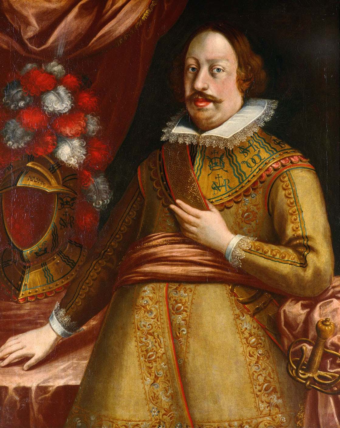 Image capturée sur Internet, Auteur: Probablement Martin Theophil Polack d'après Justus Sustermans vers 1626 ou1630. Localisation : Château d'Ambras, Innsbruck, Autriche. Selon le service "Kunstvermittlung" du Kunsthistorisches Museum, de Vienne (Wien), Ce tableau est déposé au château d'Ambras à Innsbruck, avec la mention "auteur anonyme". Données à vérifier